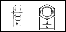 ISO 7042